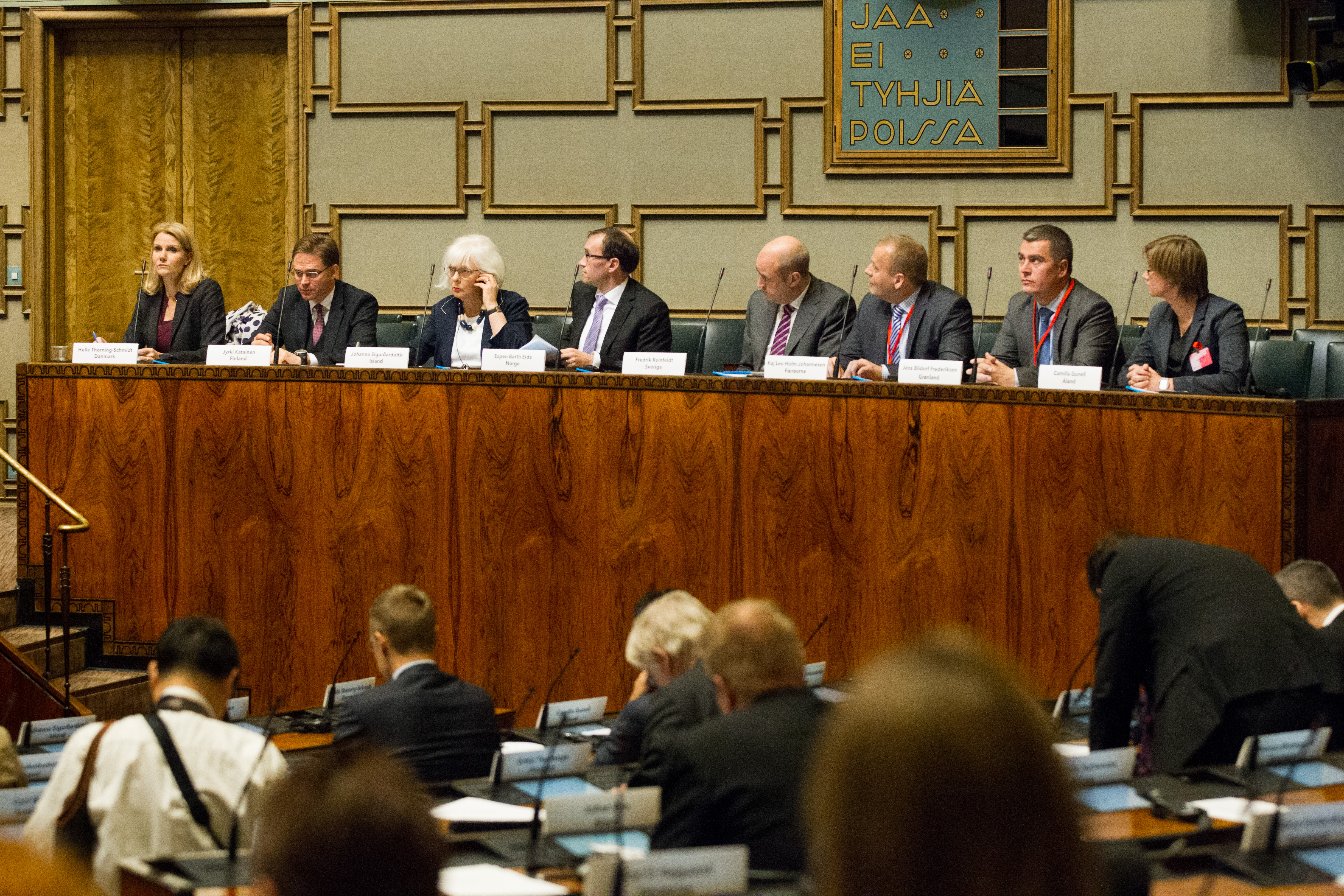 Nordiska rådets session i Helsingfors.